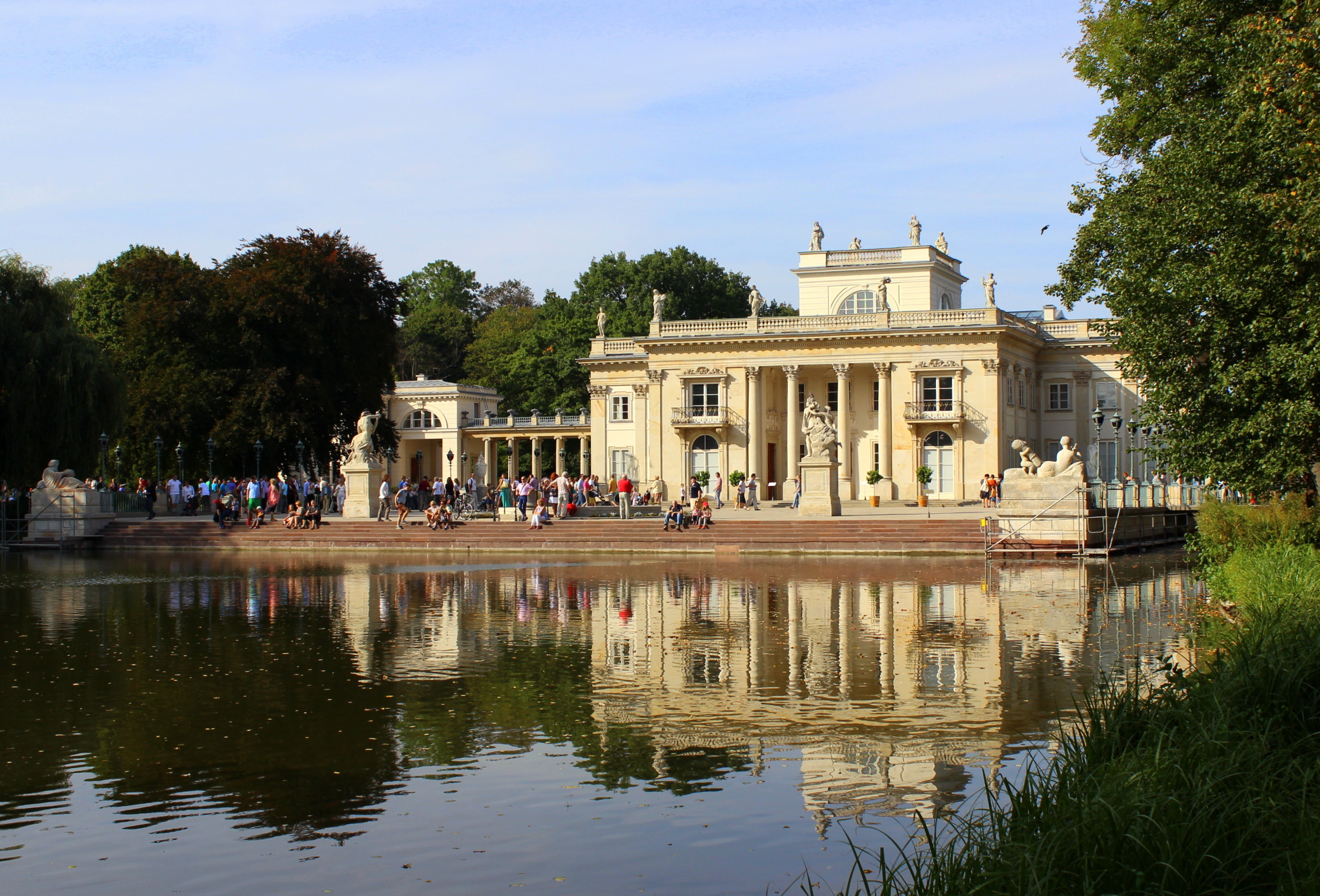 Warszawa, Pałac na Wodzie, XVII, XIX